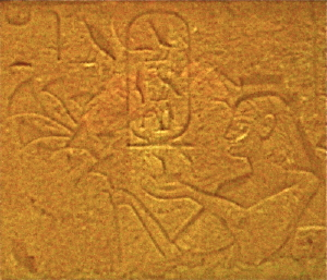 Queen Tuya